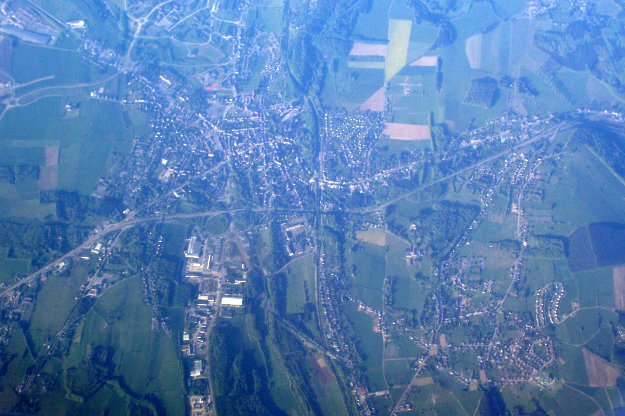 Luchtfoto van Marche-en-Famenne België Marche-en-Femenne